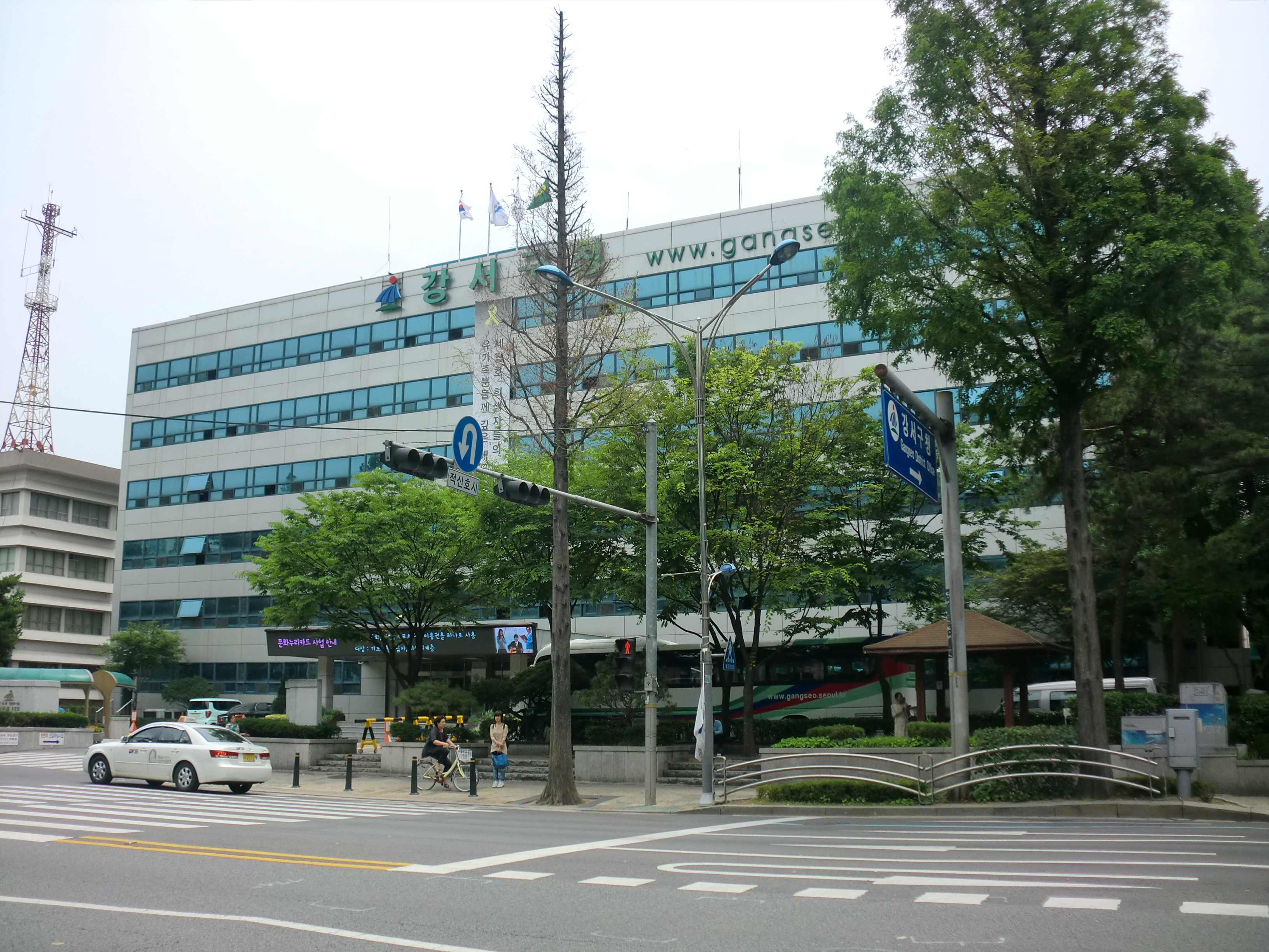 서울특별시 강서구에 있는 강서구청